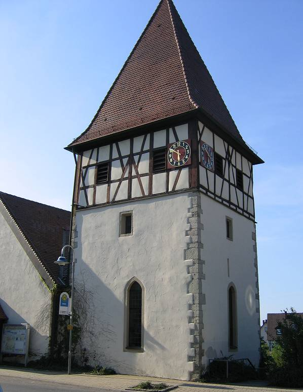 Kirche in Eibensbach; Ortsteil von Güglingen Fotografiert von Mussklprozz am de:1. Mai de:2005